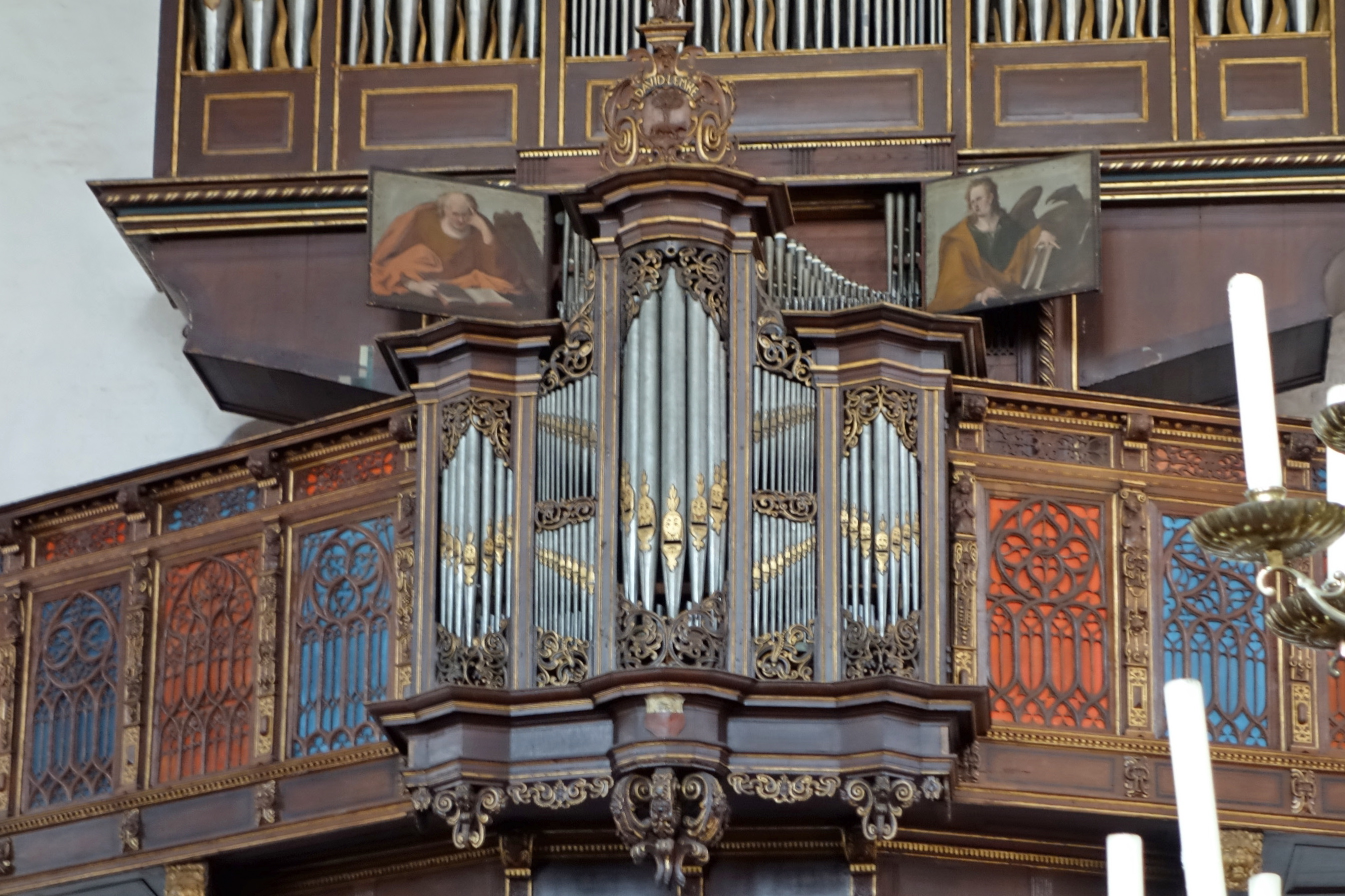 Stellwagen-Orgel in Lübeck, Jakobikirche, Schleswig-Holstein